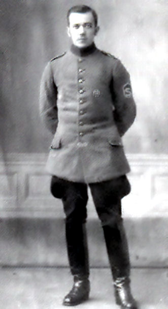 Jääkärivänrikki Otto Aukusti Savolainen